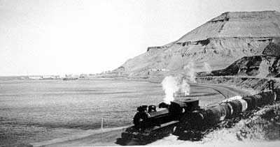 Locomotora llegando a km 3, al fondo el Cerro Chenque